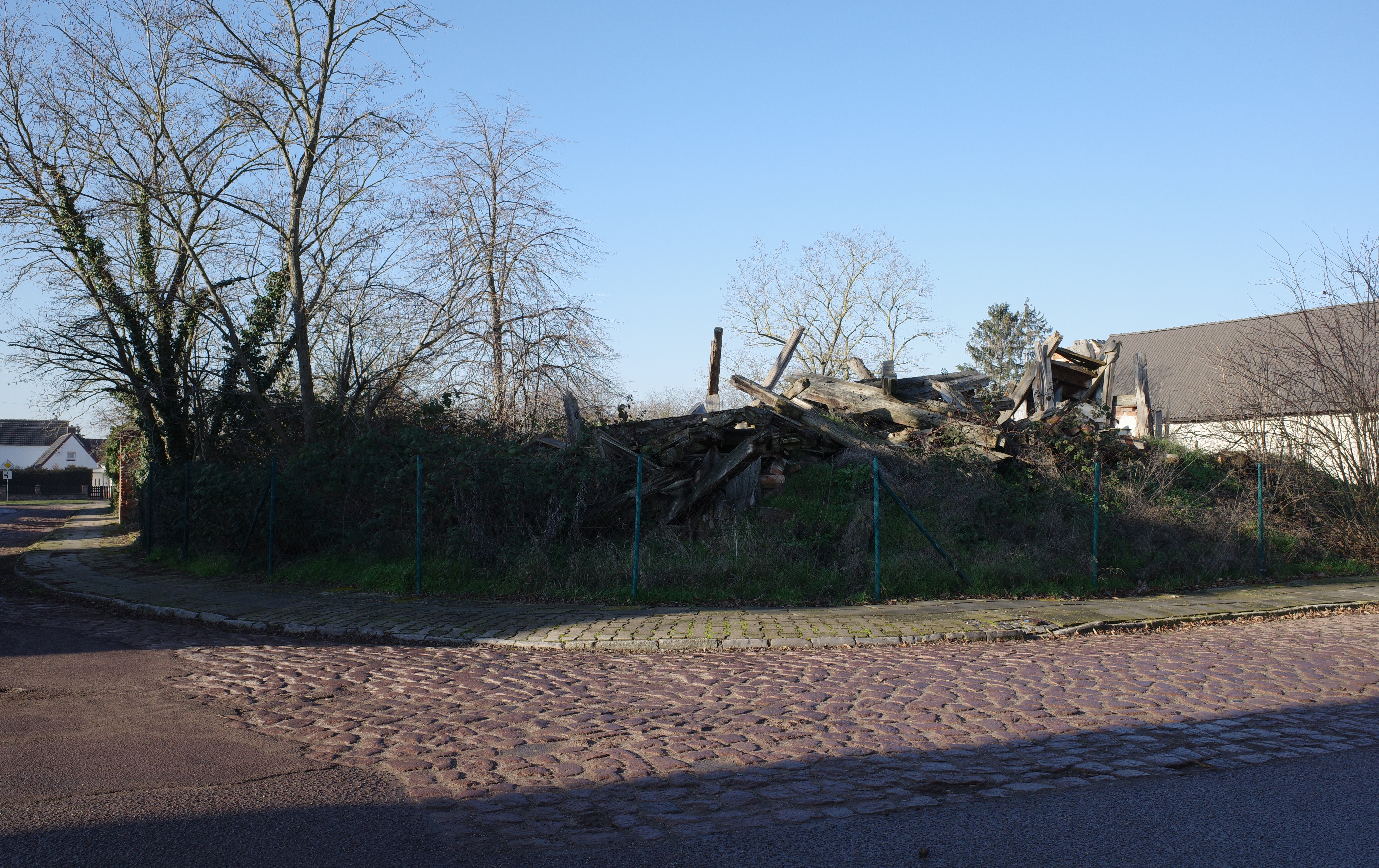 Stadt Südliches Anhalt, Ortsteil Lausigk. Das ehemalige Pfarrhaus.